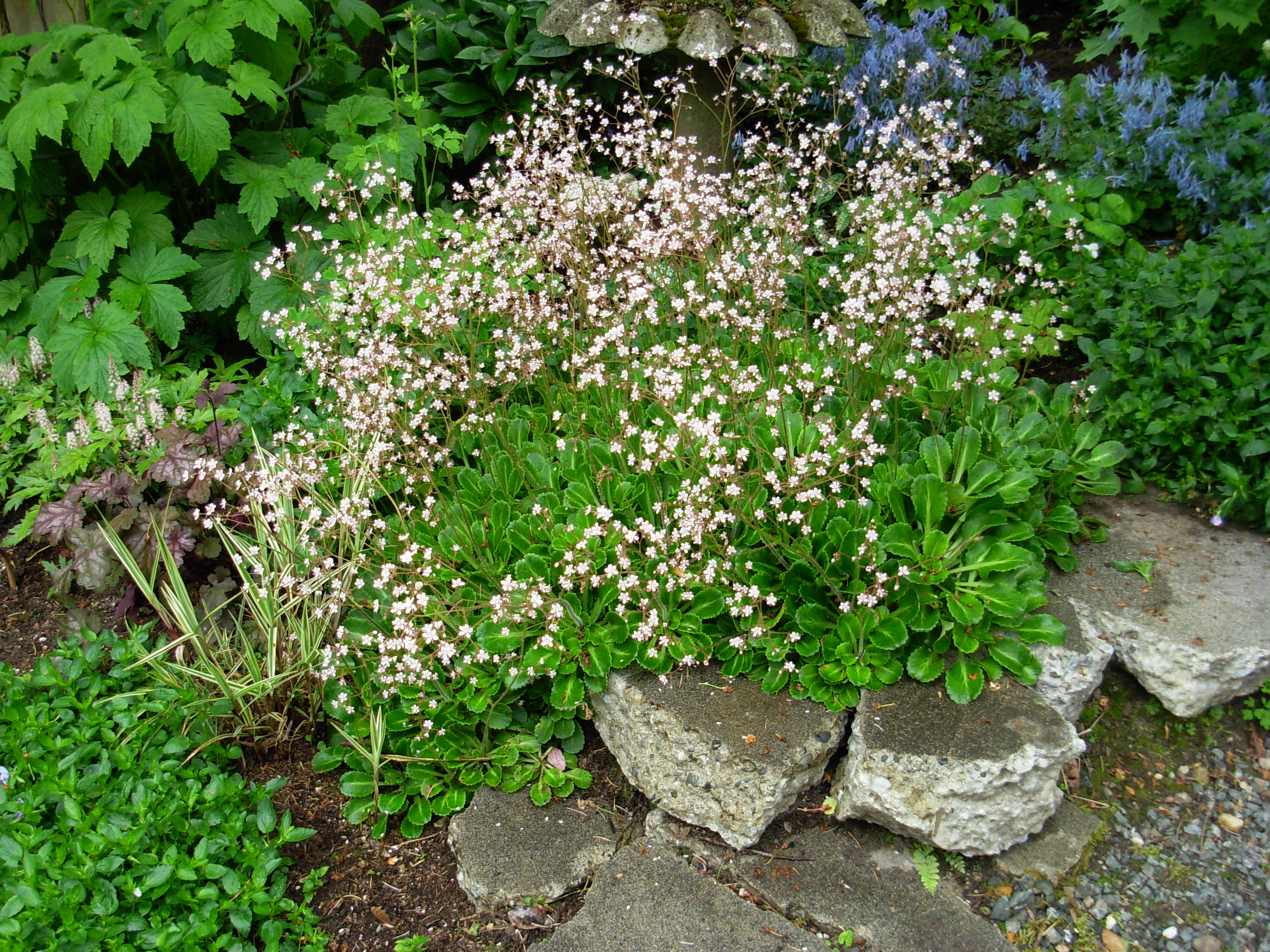 i060108 033